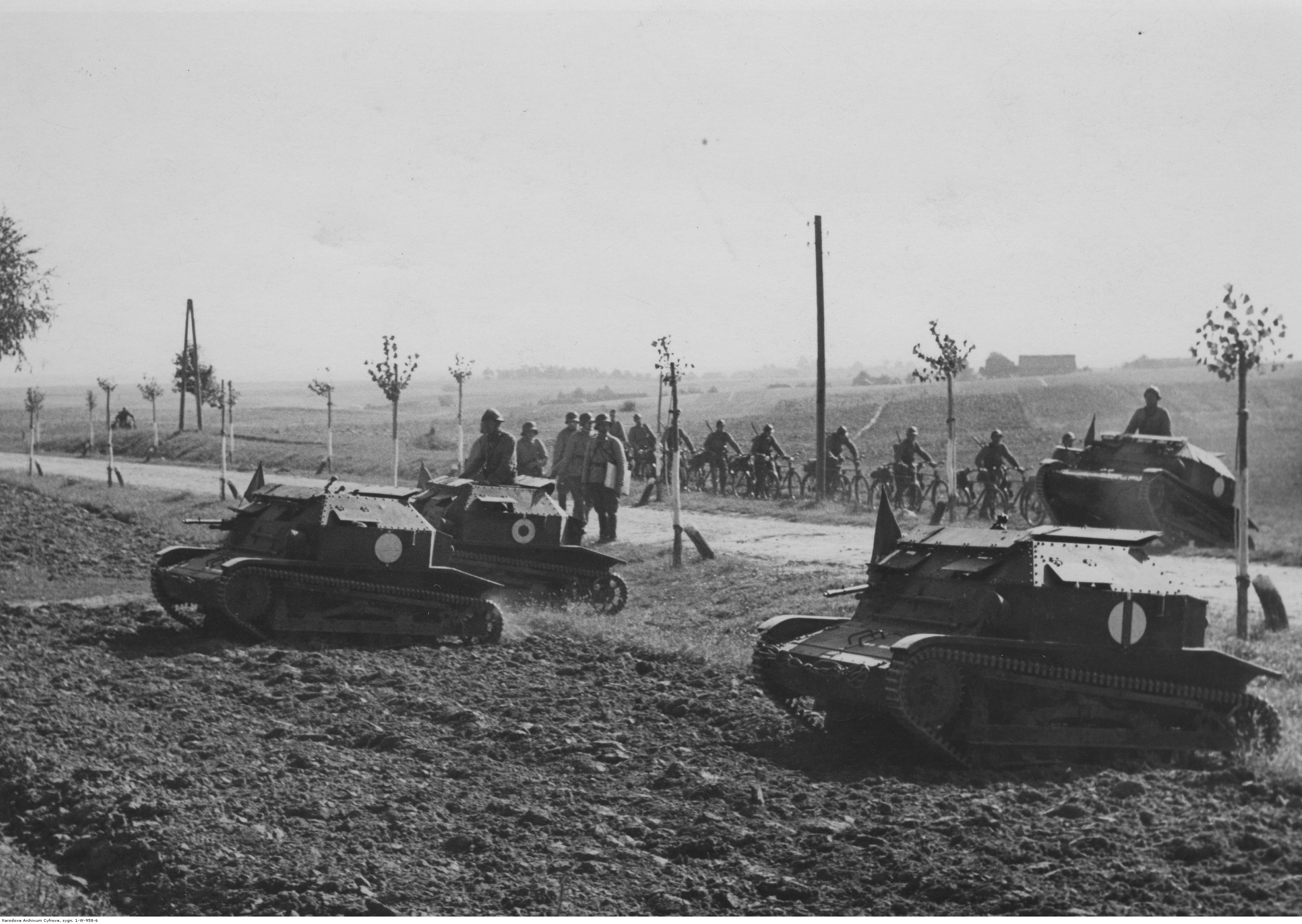 Tankietki TK-3 przy przeprawie przez drogę. W głębi widoczna drużyna cyklistów prowadząca rowery. [opis oryginalny]